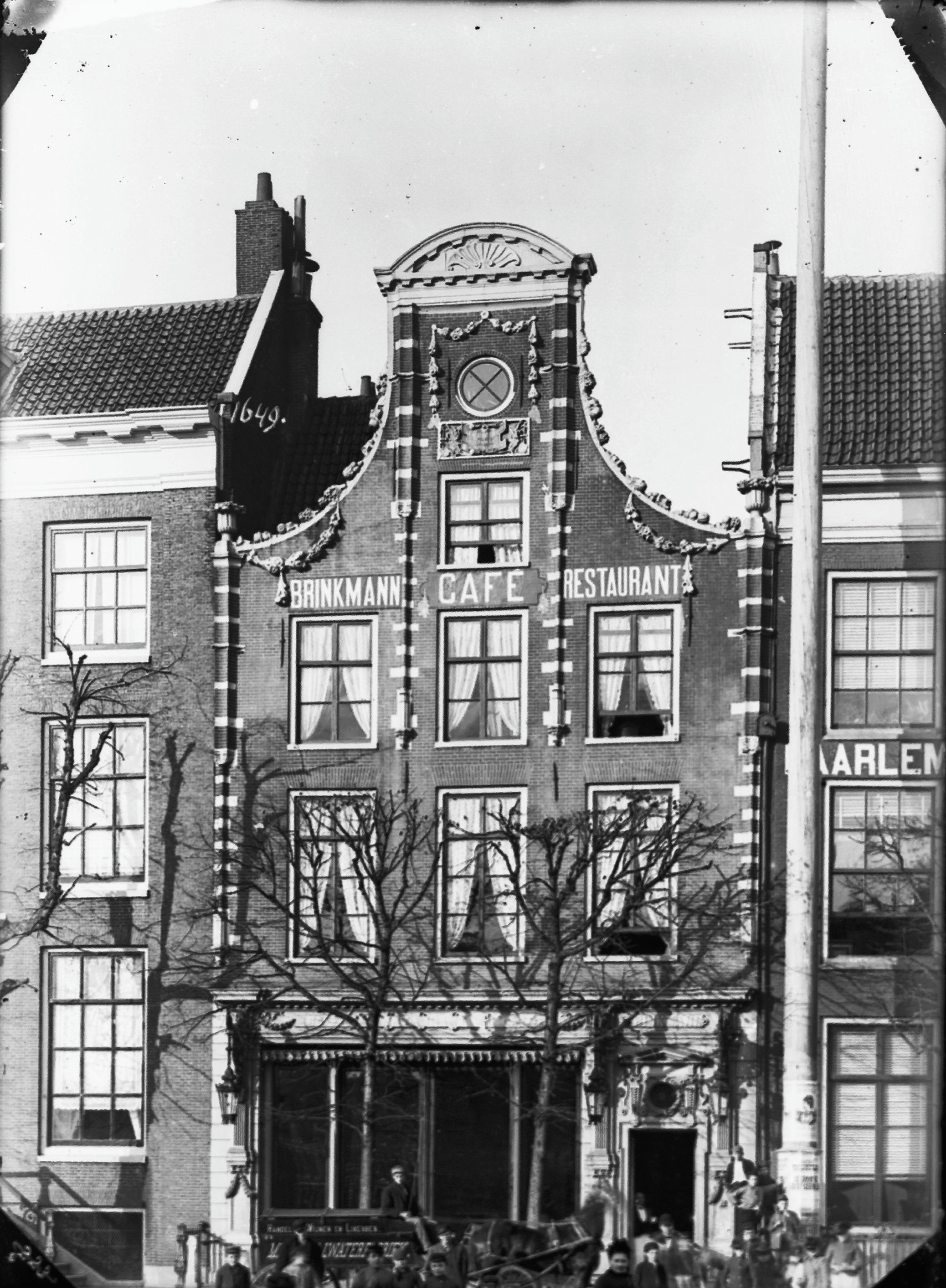 voorgevel